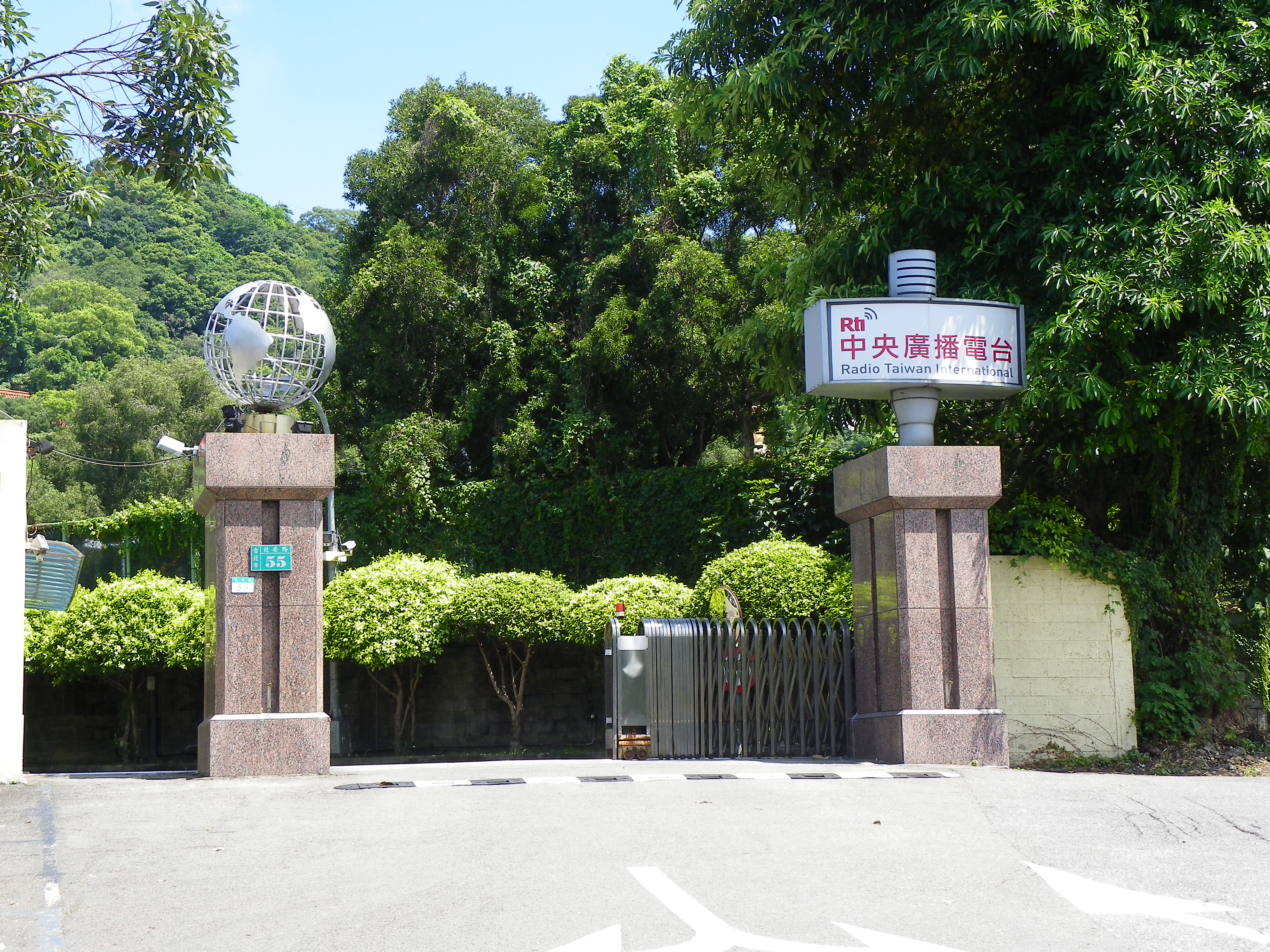 中央廣播電臺正門，地址：臺北市中山區北安路55號。